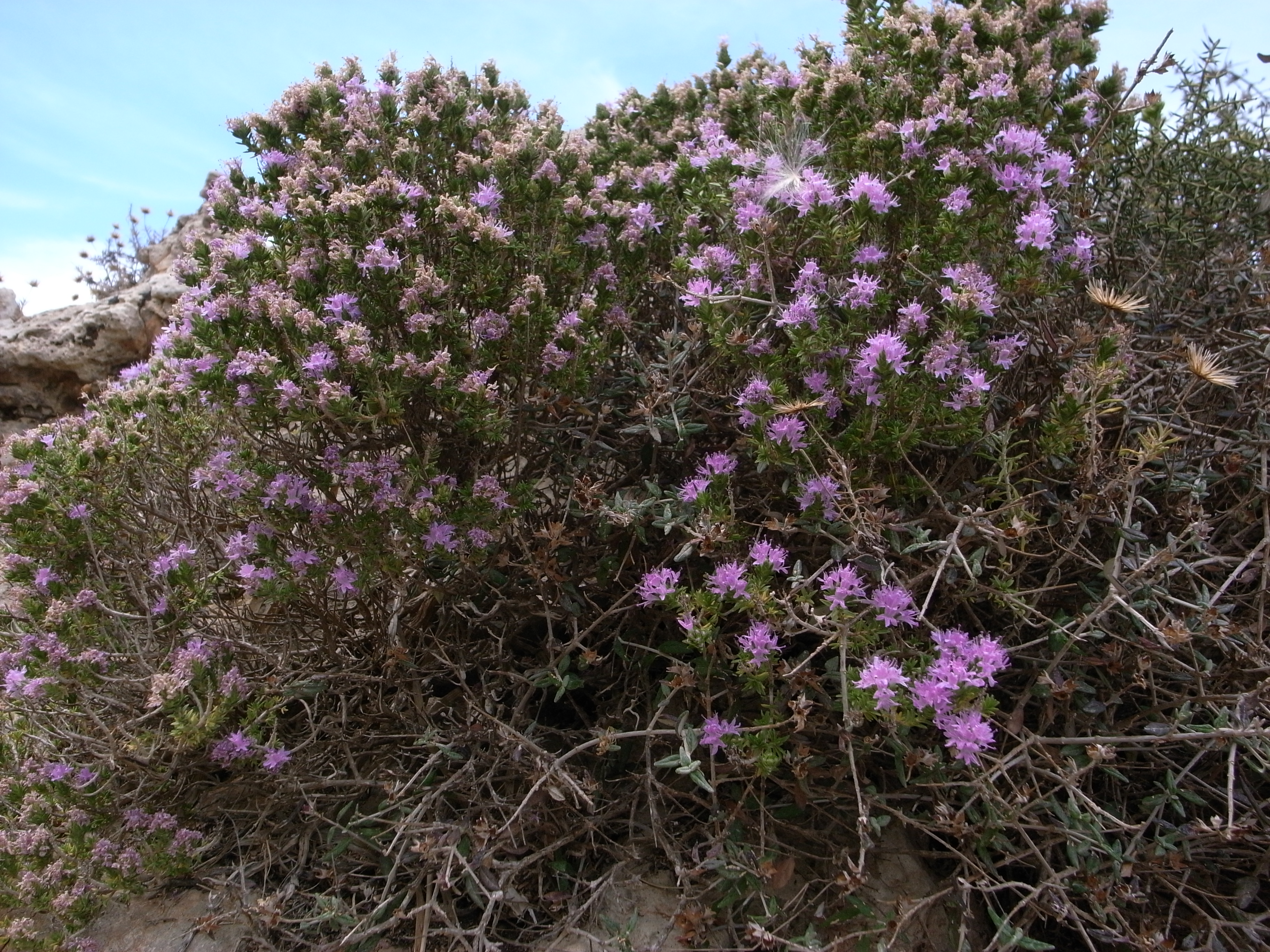 Thymbra capitata, Ghajn Tuffieha, Malta Habitus